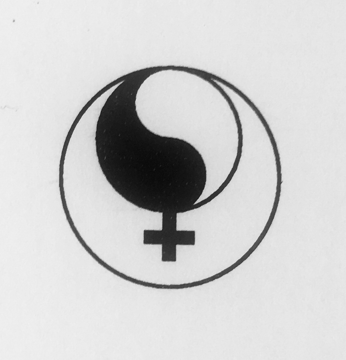 Das Signum der OGPGG, angelehnt an das Symbol "weiblich"